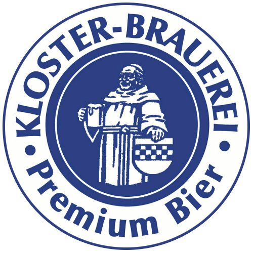 Dieses Bild zeigt das neue Logo der Hammer Biermarke "Kloster Alt" ab 2010.